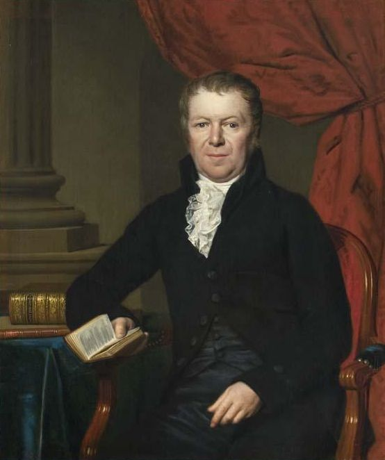 Portret fan de jurist Daam Fockema (1779-1855)